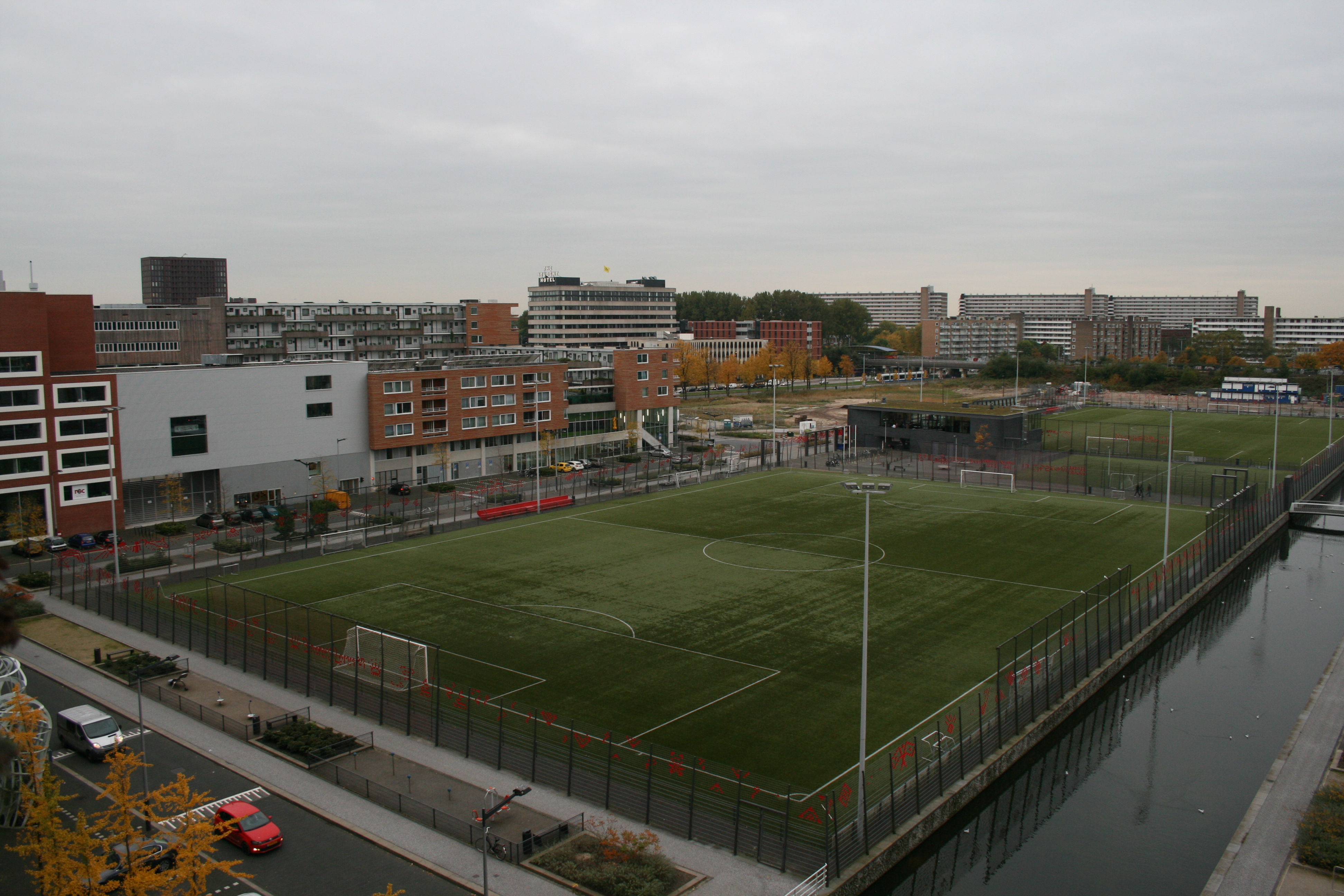 Voetbalvelden van voetbalclub VVA/Spartaan op sportpark Laan van Spartaan, Amsterdam Bos en Lommer (stadsdeel West), 24 oktober 2015.